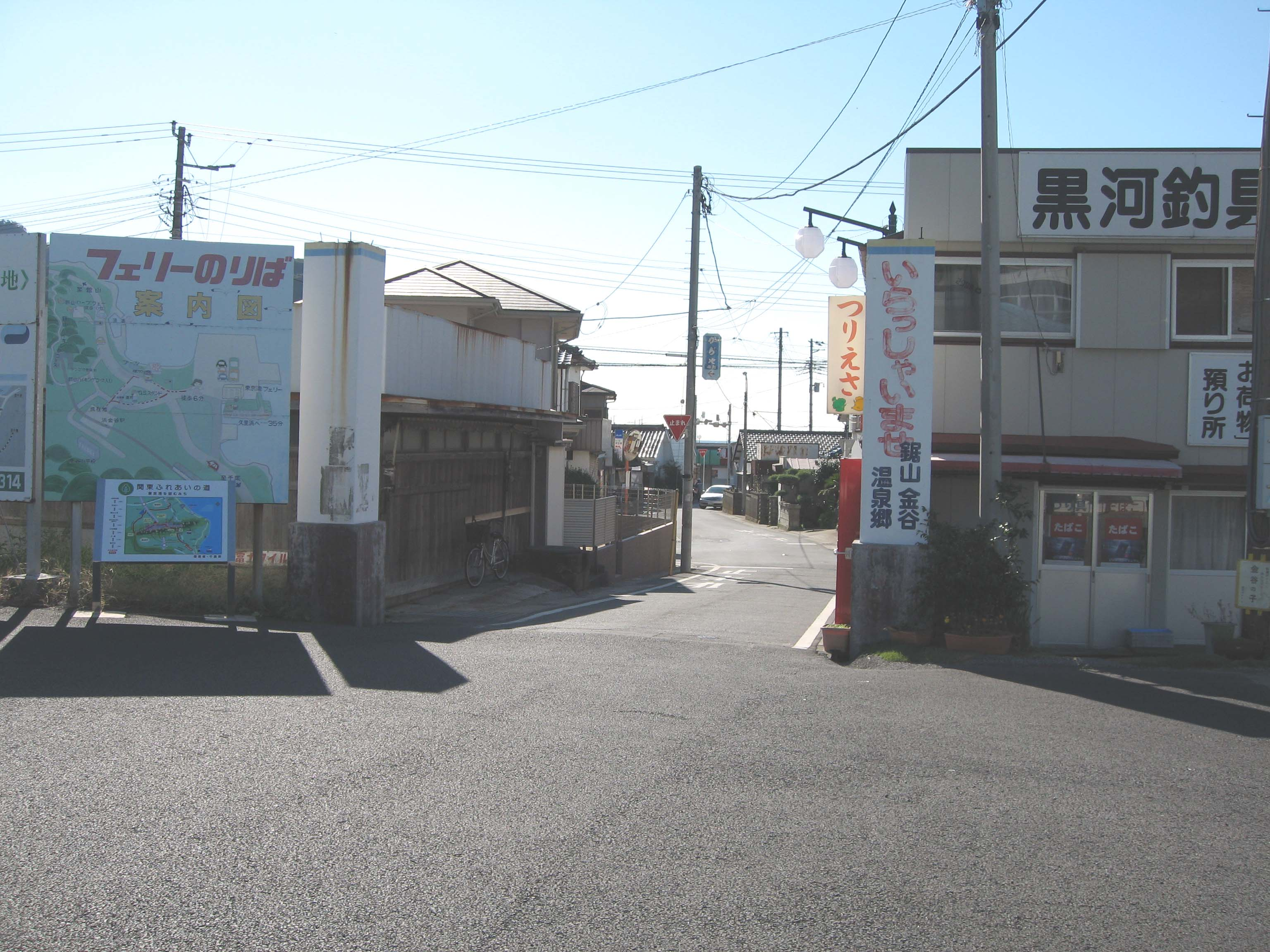 Hamakanaya station, Uchibo Line, Chiba, Japan, 浜金谷駅駅前